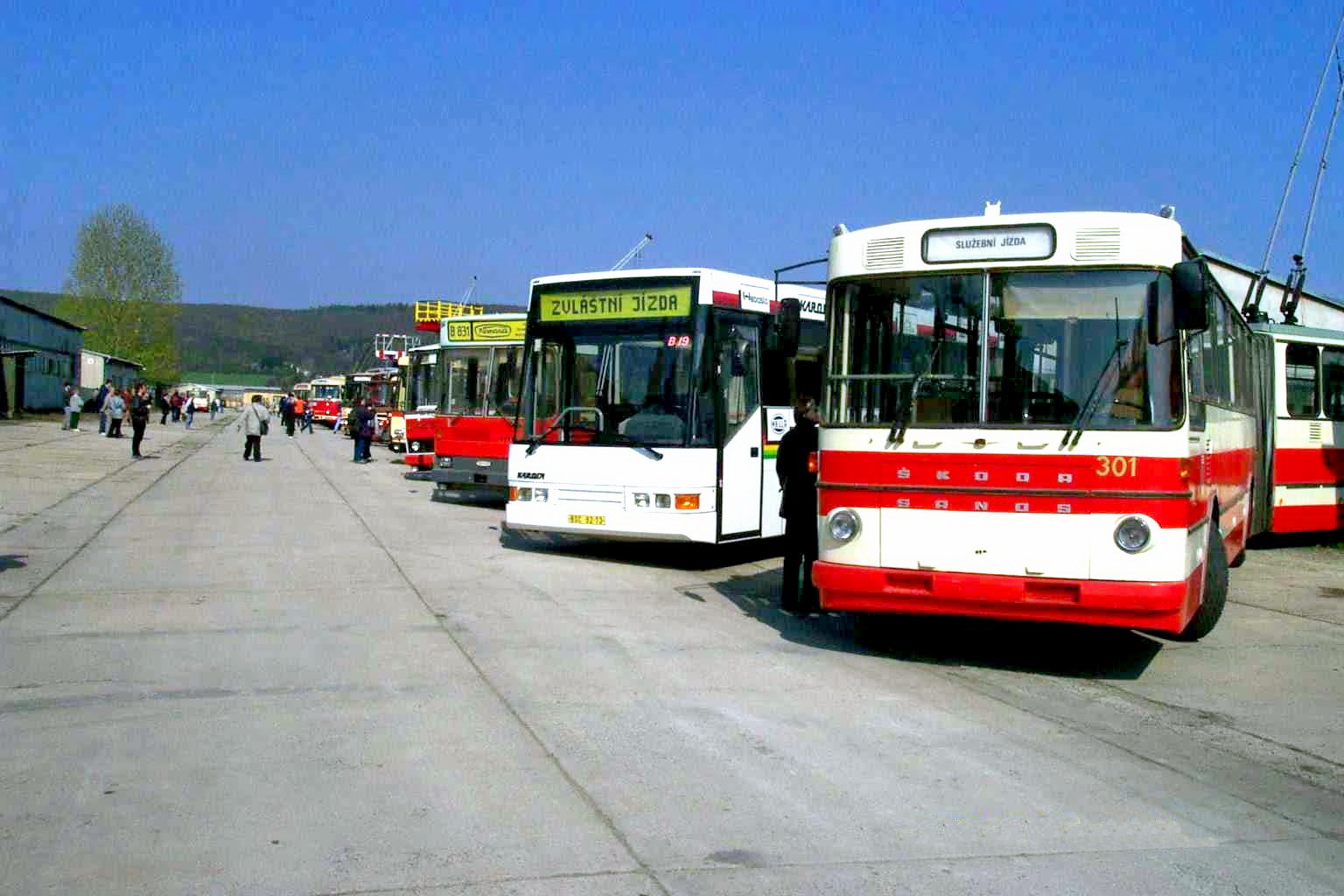 Různé historické autobusy a trolejbusy Zprava doleva: 1) Škoda Sanos, 2) Karosa Legobus 3) Karosa B 831 4) Karosa B 731 5) Škoda 14 Tr a další